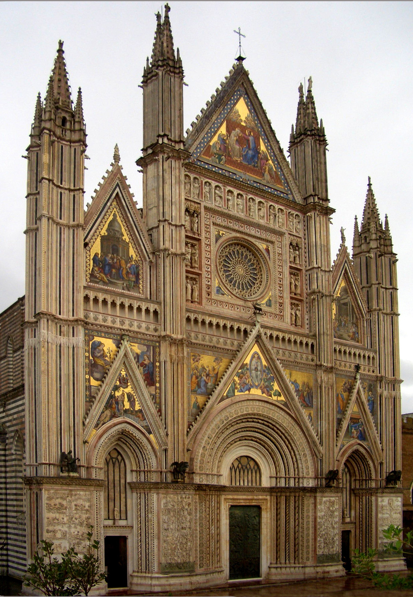 Foto scattata da me il 16.9.06.